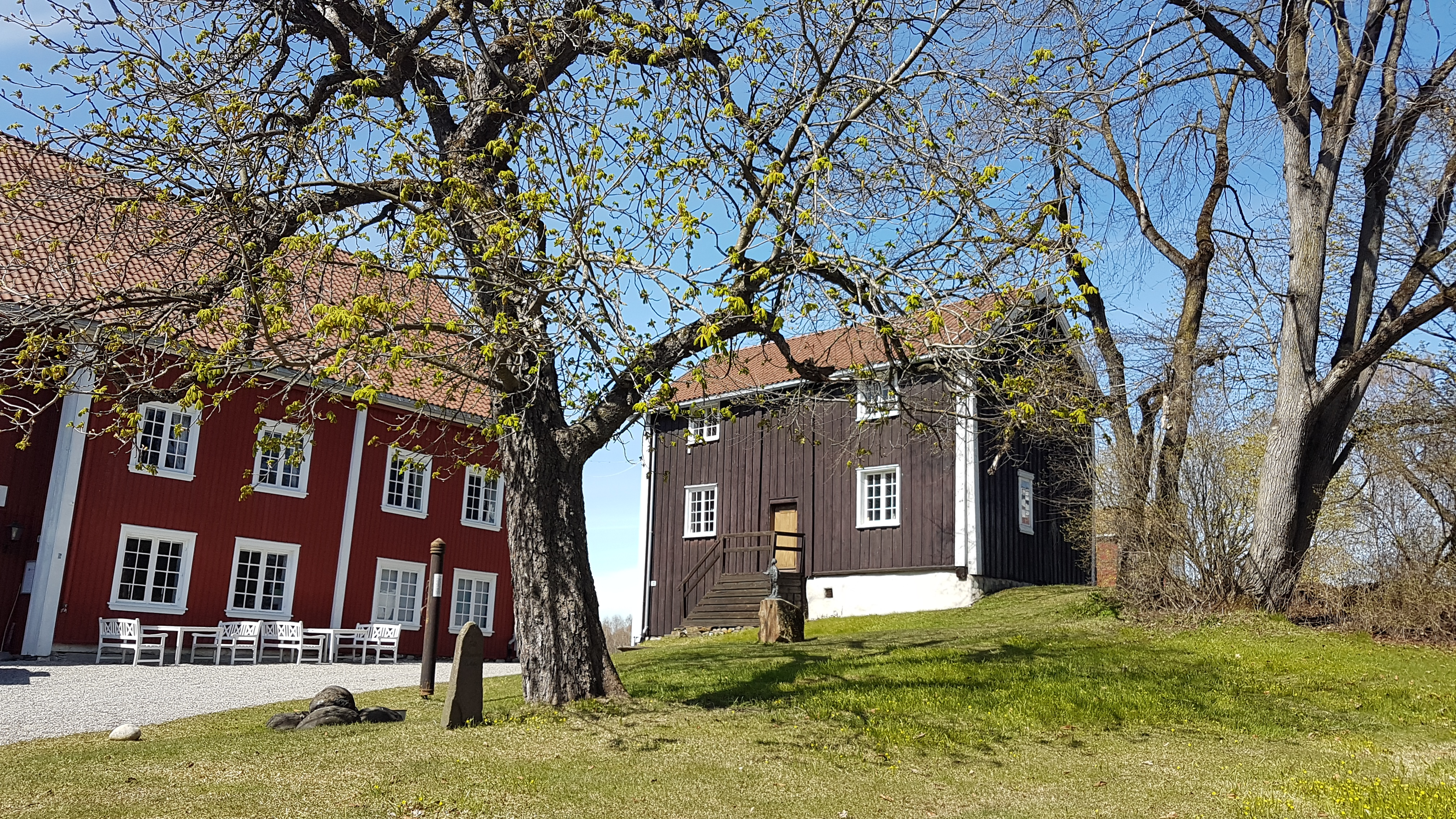 Norderhov gamle prestegård og Munkestua